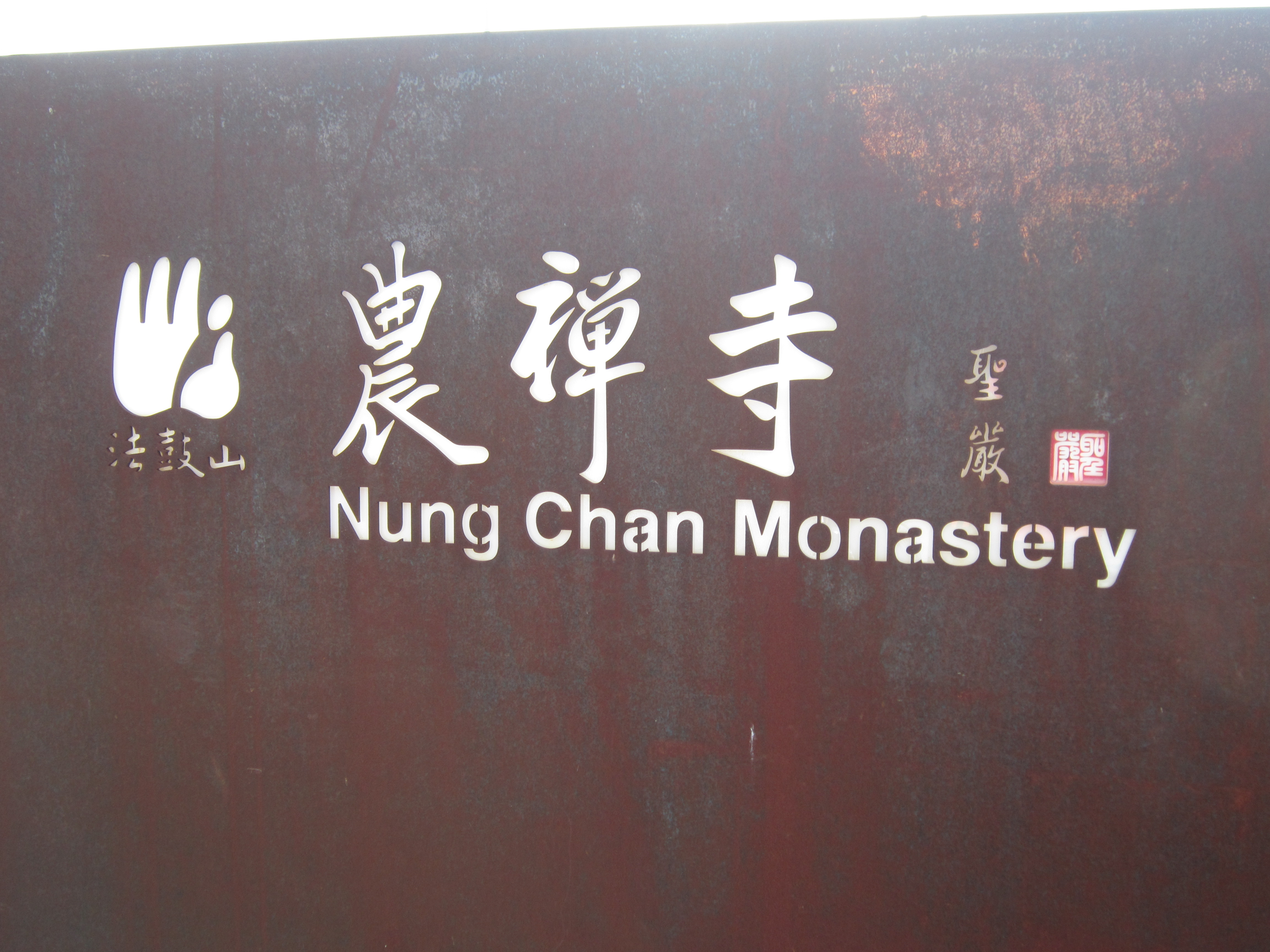 法鼓山農禪寺入口標誌